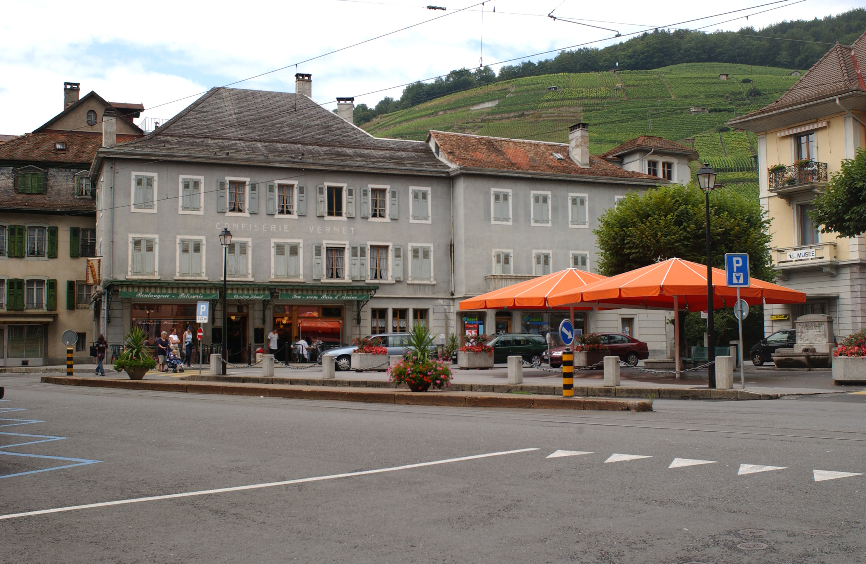 Bex (Vaud) : Place du Marché